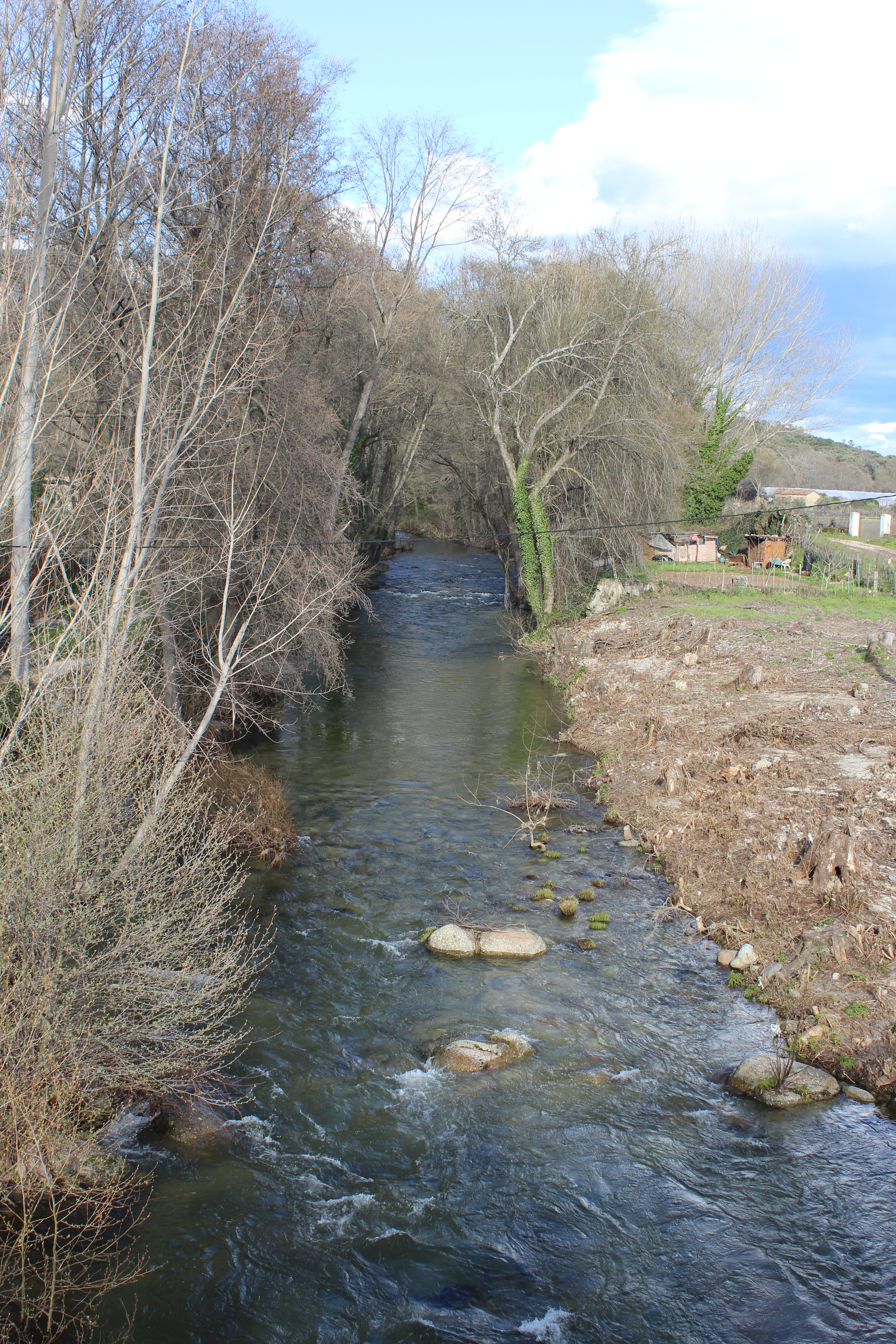 Río Ramacastañas.